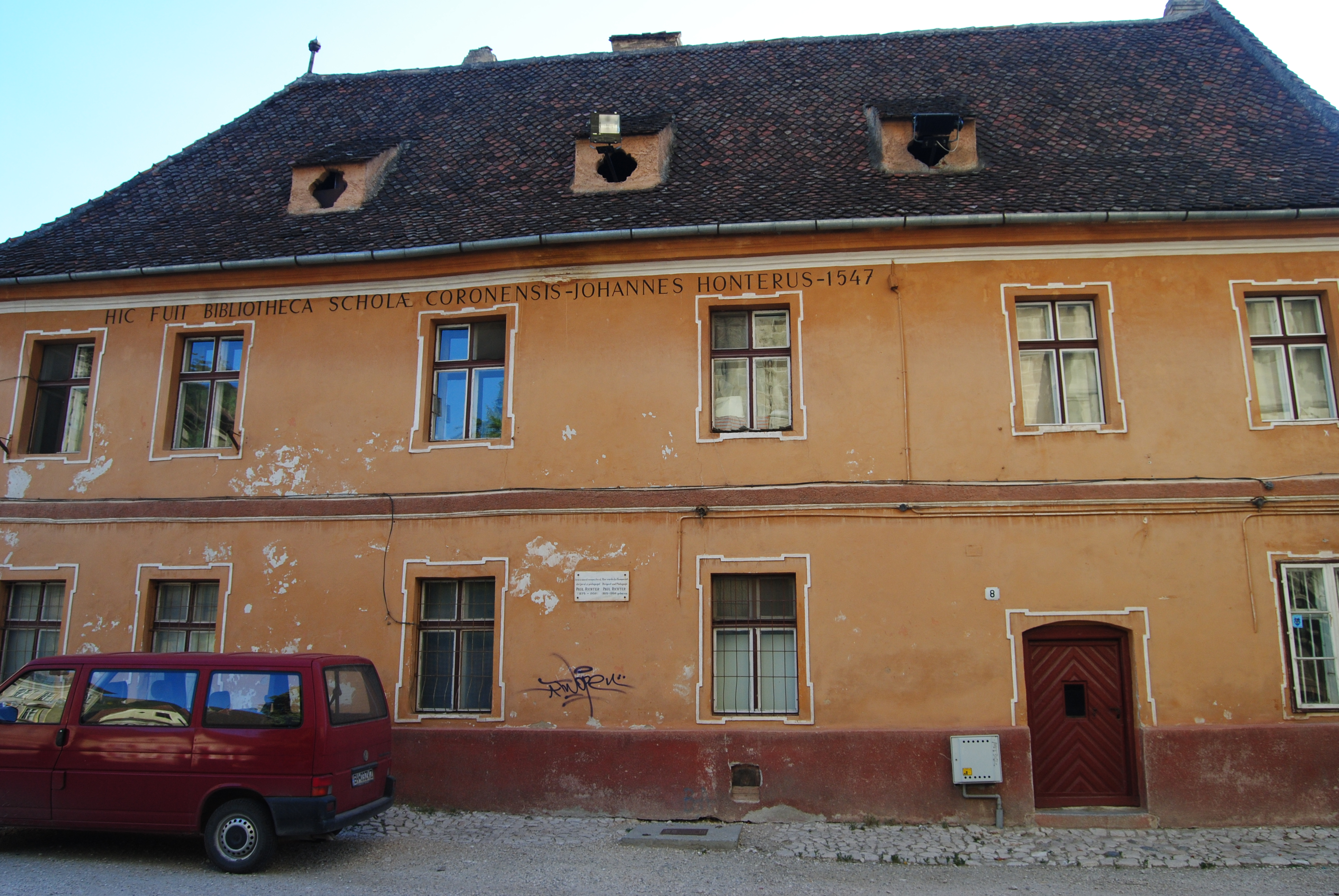 Fosta casă a Rectorului, azi locuință; Curtea Honterus nr. 8, Brașov